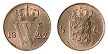 Afbeelding van Nederlandse 1/2 cents munt uit 1822